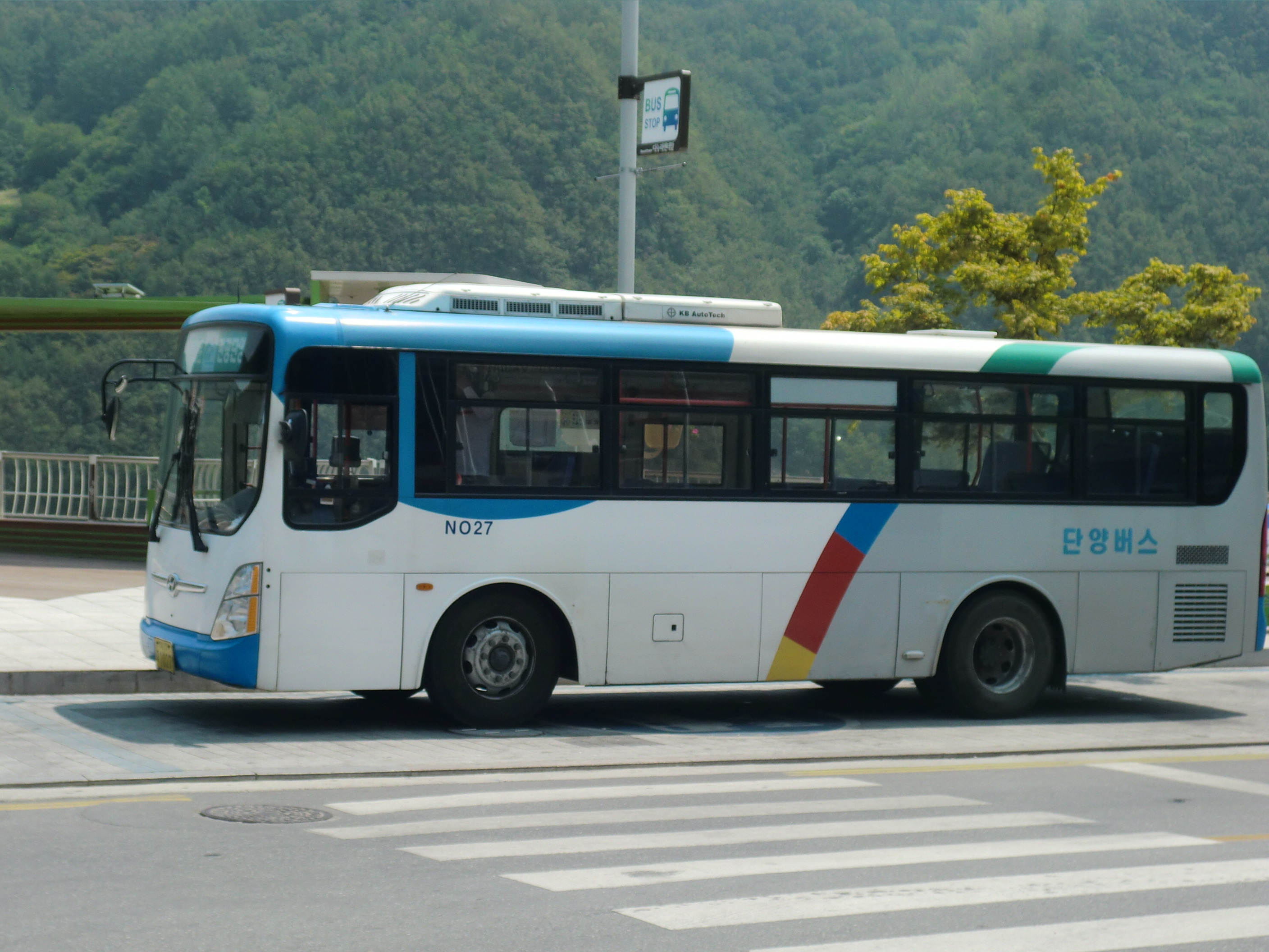 단양군내버스